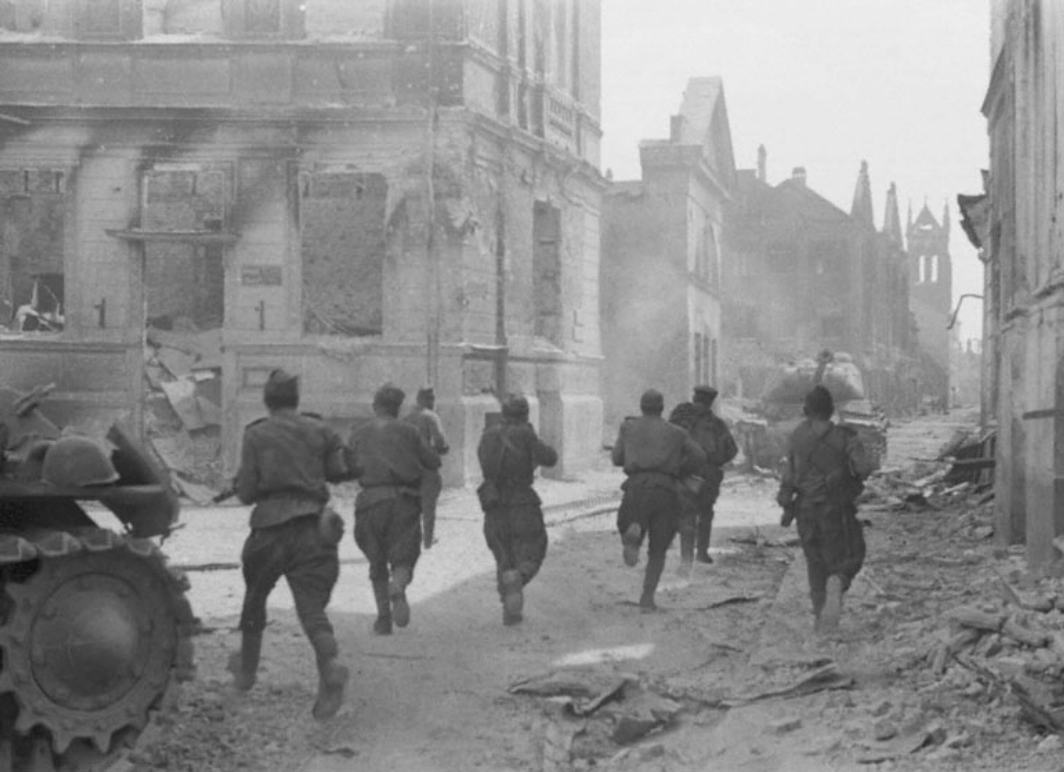 Sowjetische Soldaten der 1. Baltischen Front während eines Angriffs in der lettischen Stadt Jelgava (dt. Mitau, rus. Mitawa)